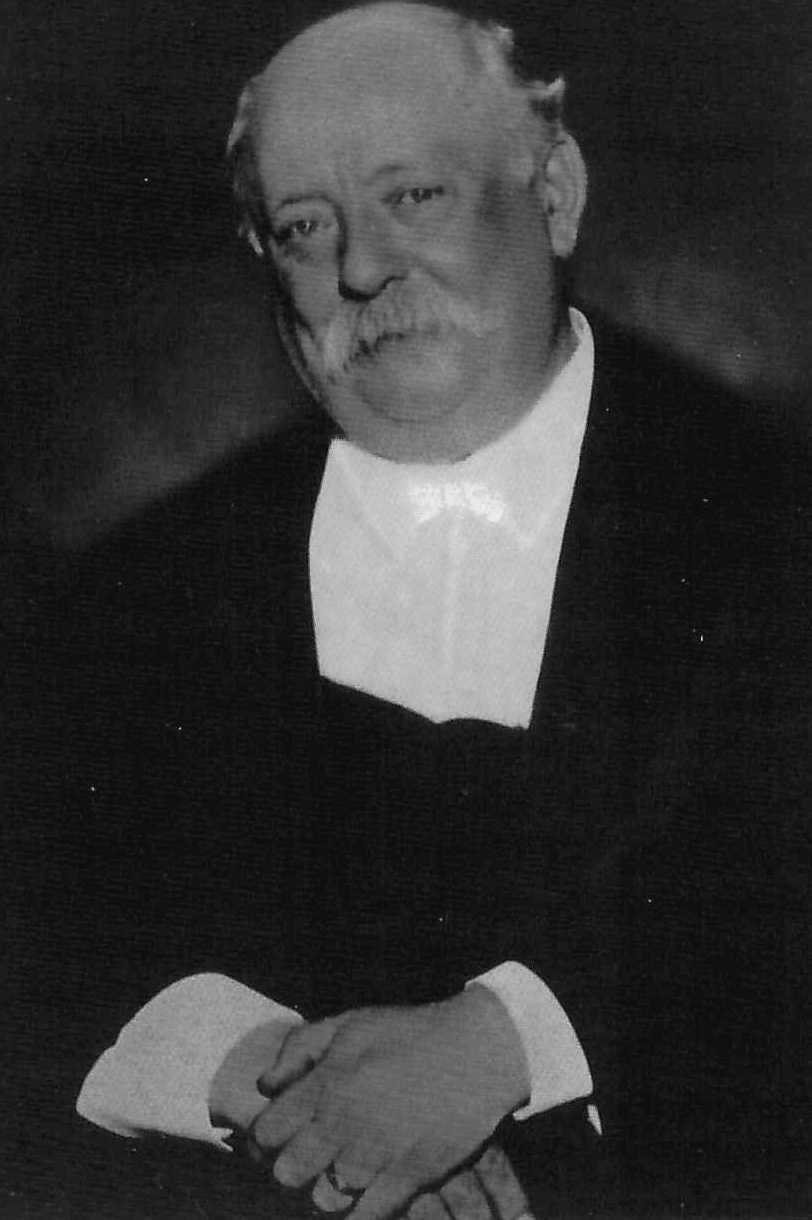 Heinrich Mau (1843–1906), königlich sächsischer Hofjuwelier